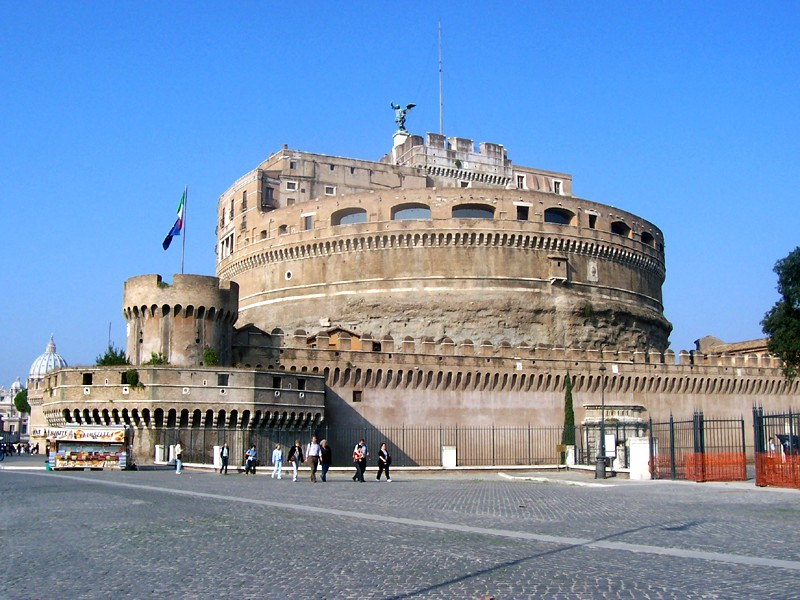 Roma - Castel Sant'Angelo